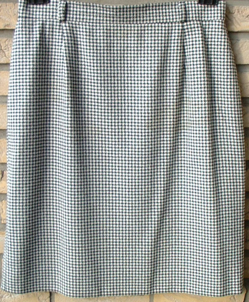 Rock aus Pepitagewebe